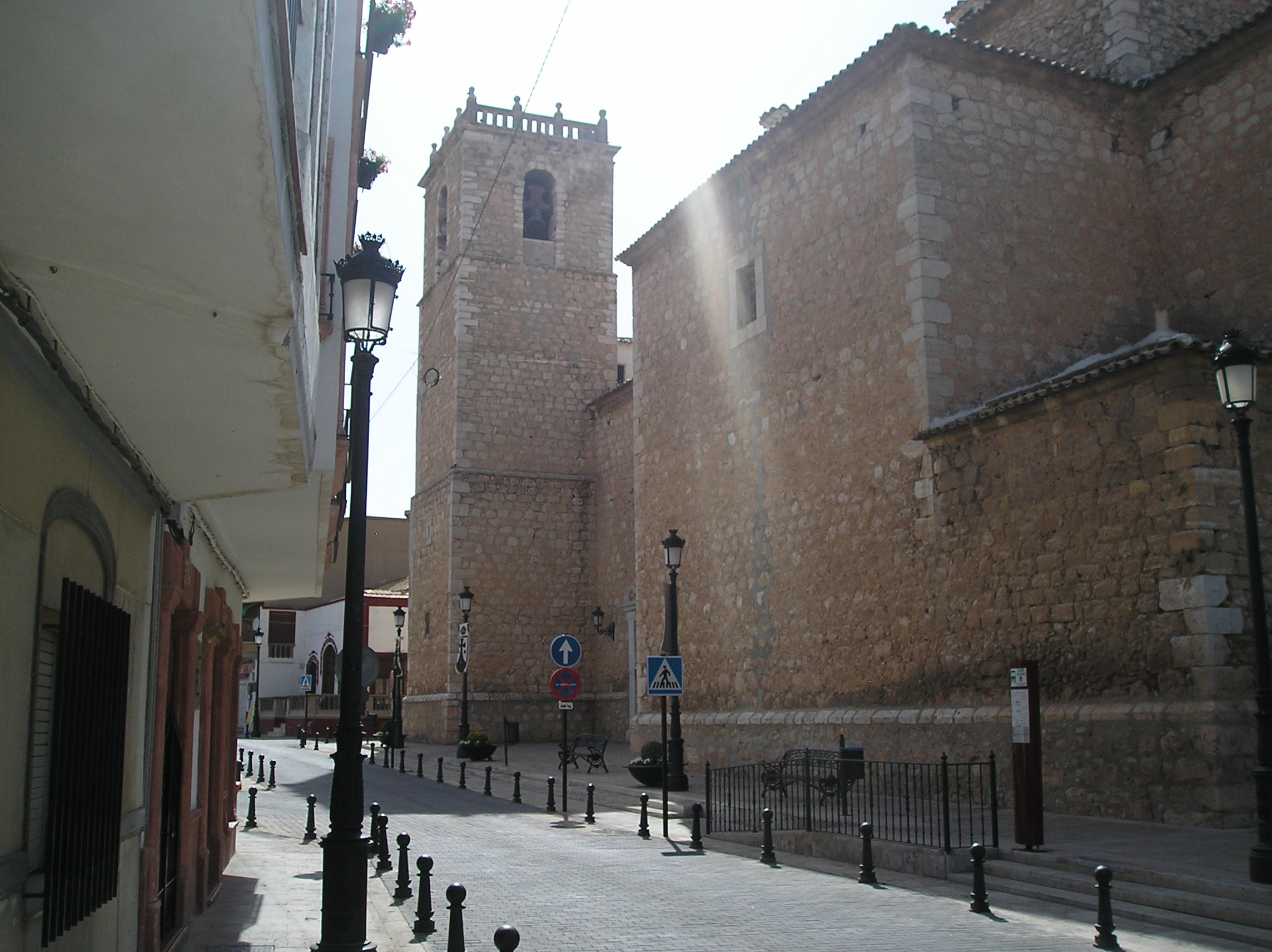 Parroquia de San Pedro Apóstol en Pedro Muñoz